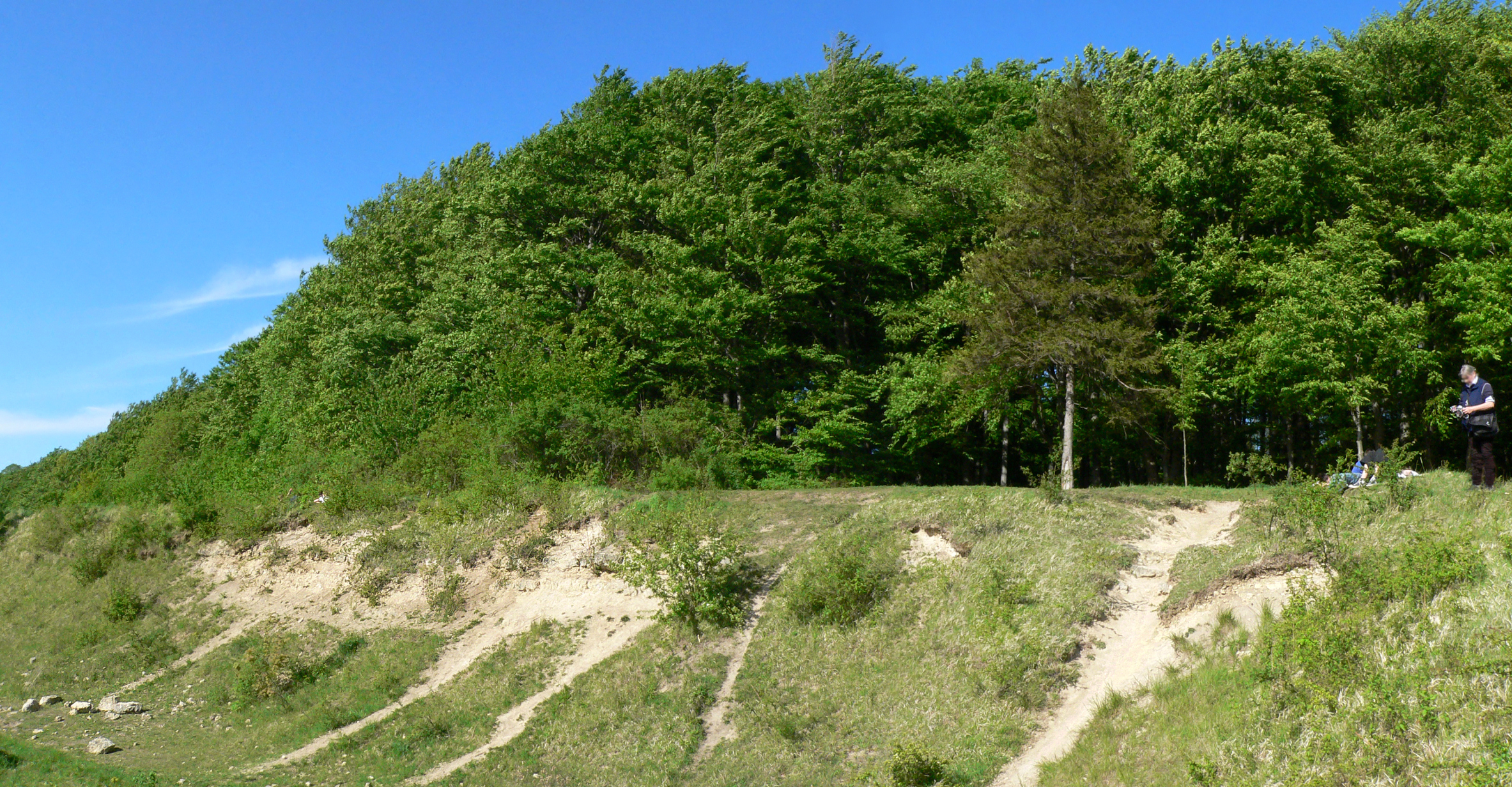 Ehemalige Mergelgrube am Westhang zwischen den beiden Kuppen des Köthnerberges im Landschaftsschutzgebiet „Gehrdener Berg“ (LSG H 00024), in und an der Grube u.a. Halbtrockenrasen mit seltenen Ackerwildkräutern